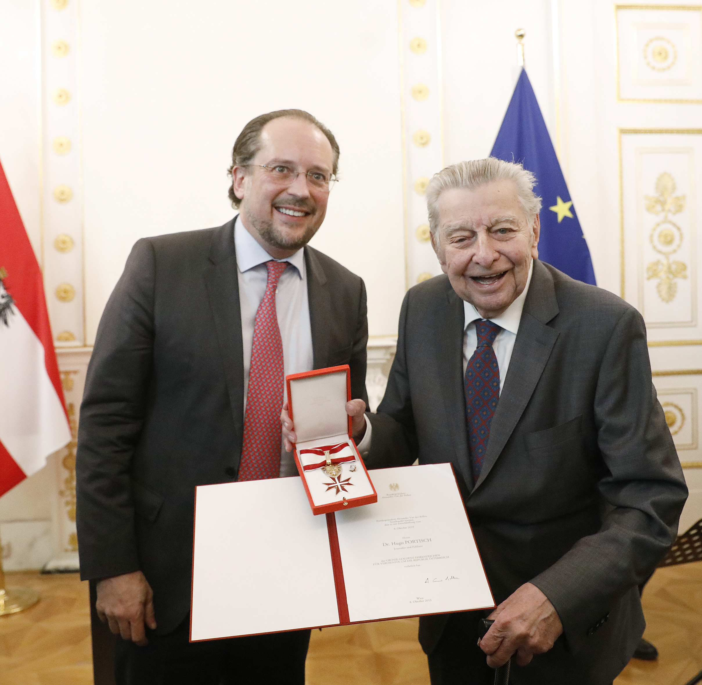 Ehrenzeichenüberreichung an Hugo Portisch durch BM Alexander Schallenberg. Wien, 18.12.2019, Foto: Dragan Tatic